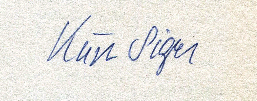 Unterschrift des deutschen Schriftstellers Kurt Sigel in einer Widmung